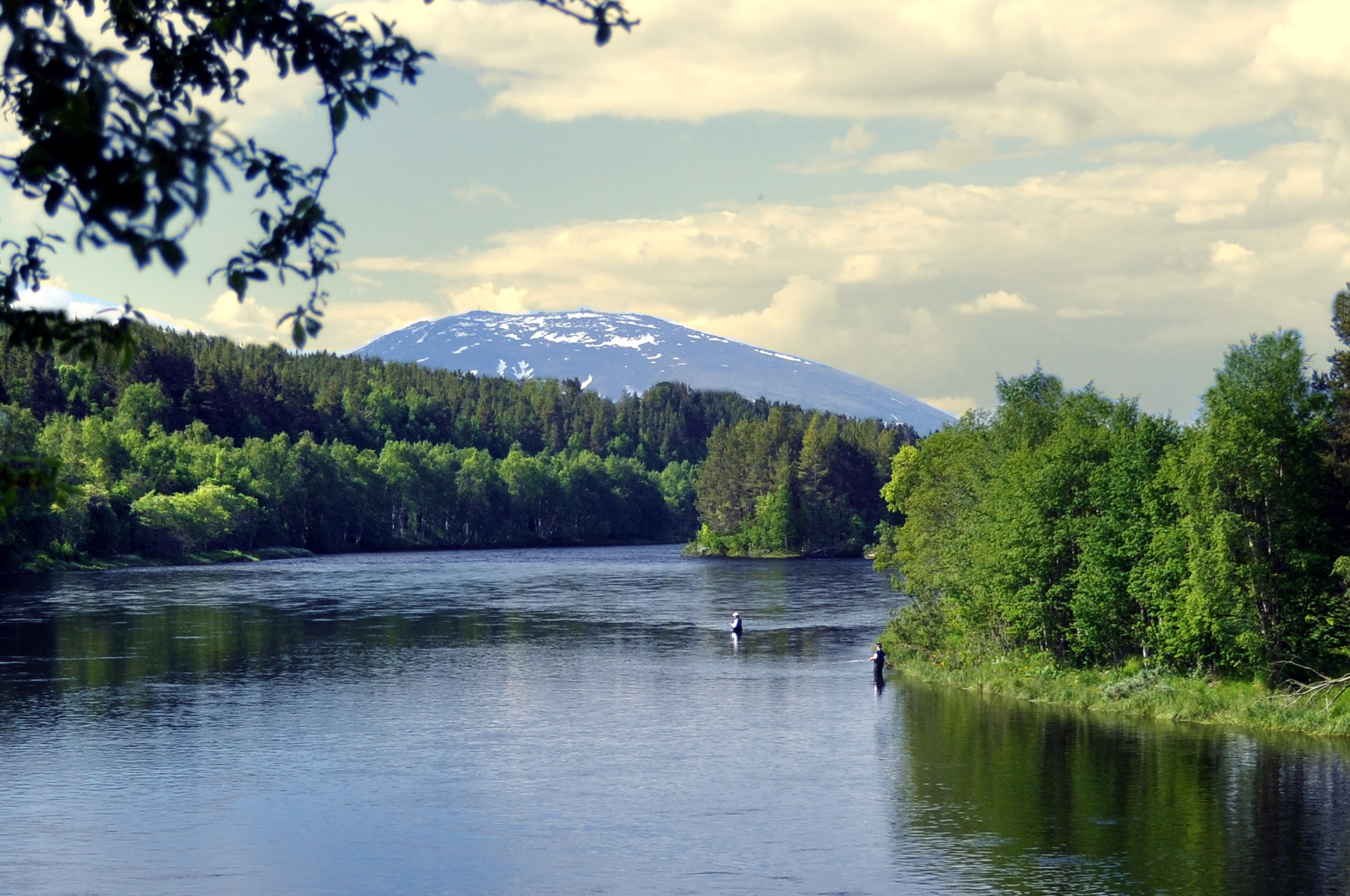 Bilde tatt ved Glomma på Telneset, med Tronfjell i bakgrunnen. 2 fiskere skimtes ute i elva også.